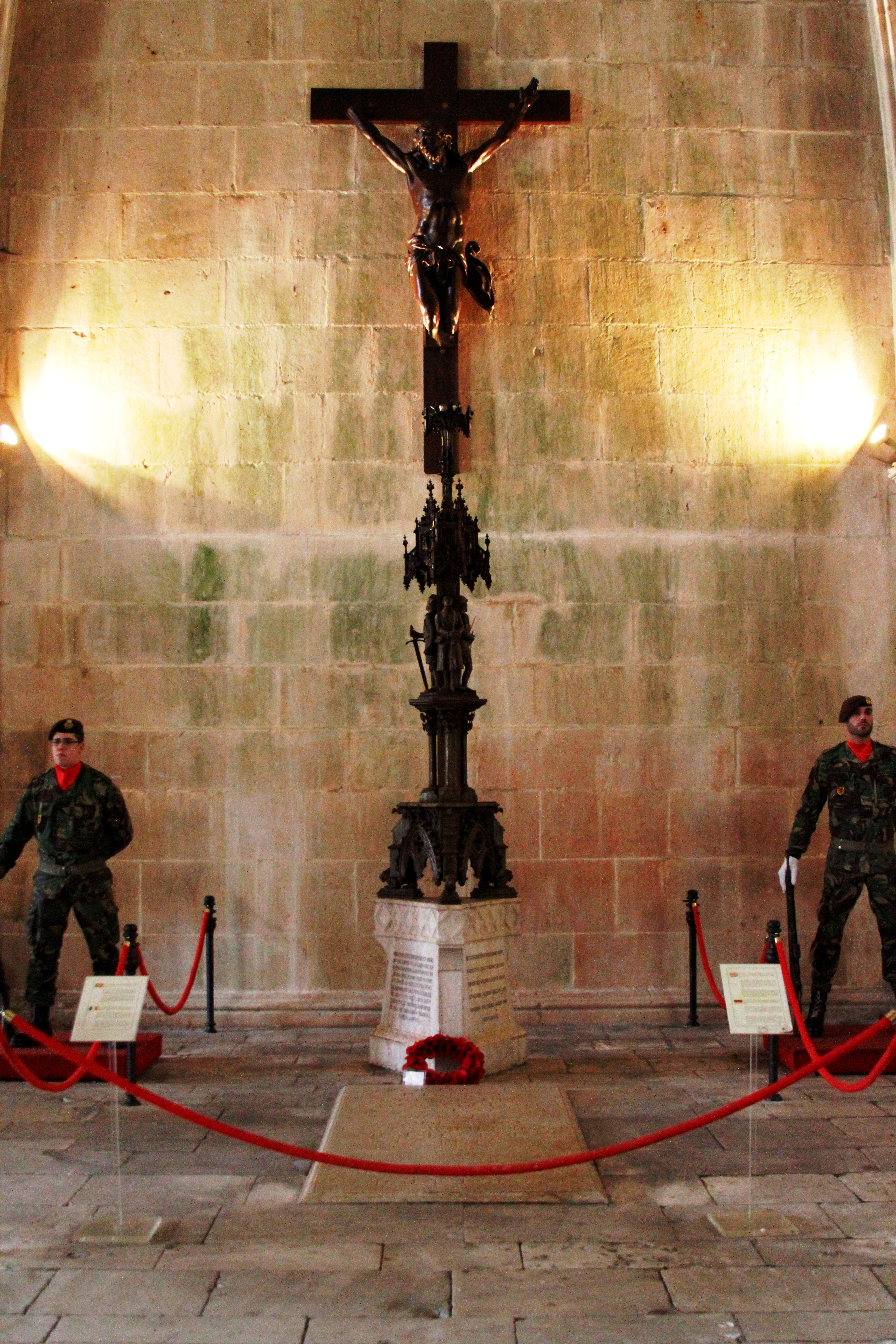 Sala do Capítulo